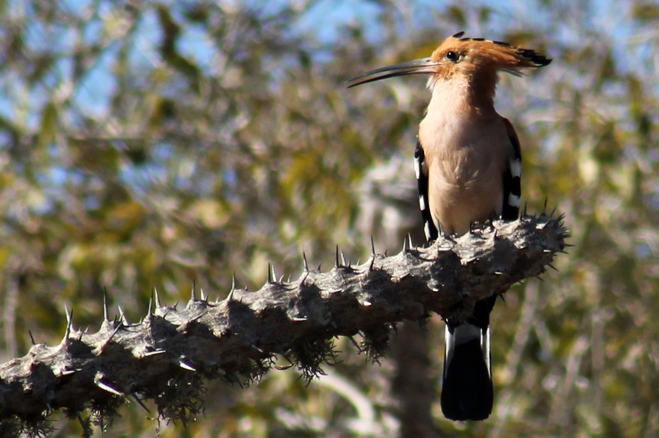 Madagaskarhop, Reniala